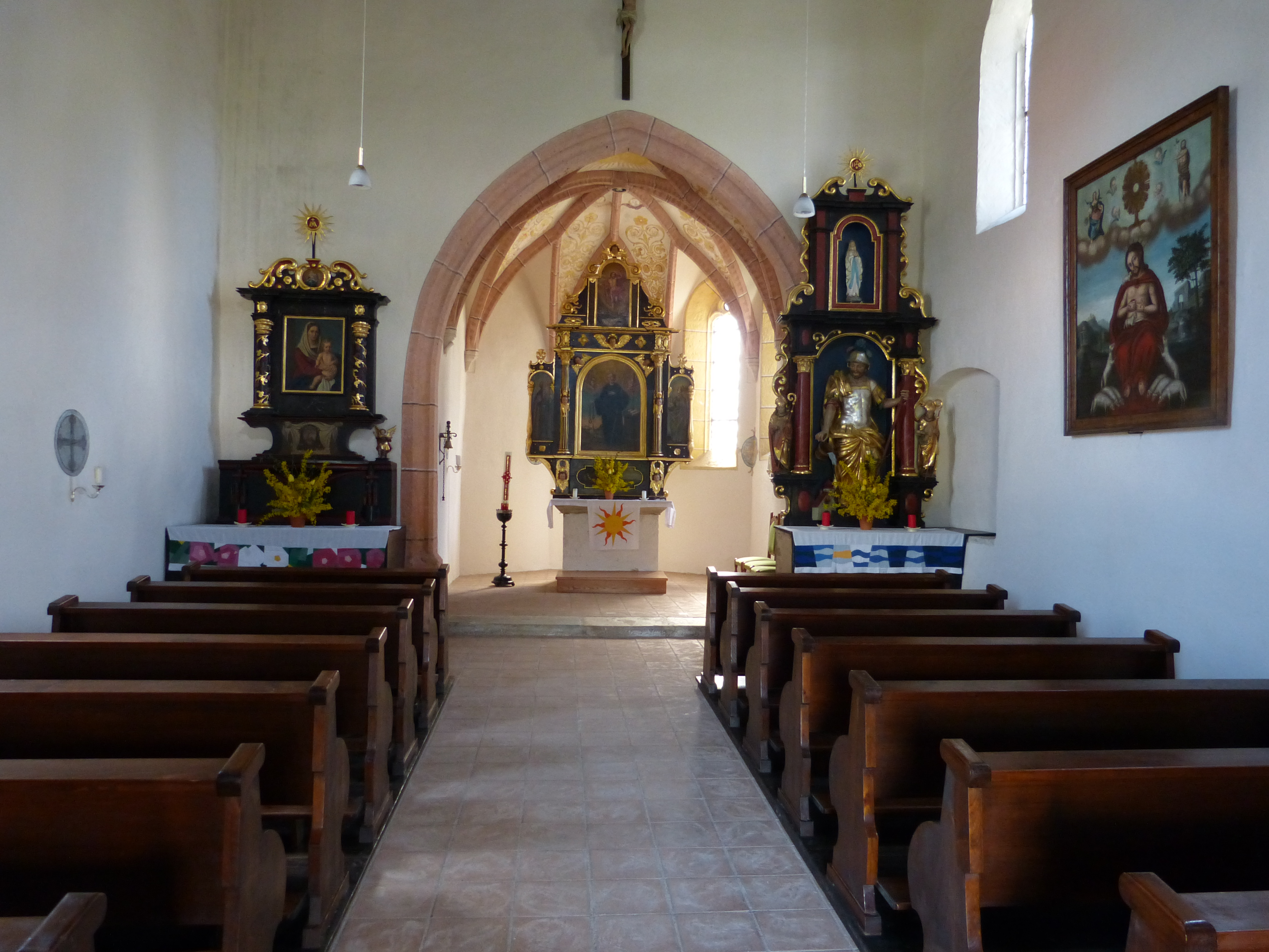 Filialkirche St. Leonhard, in Arndorf (Gemeinde Maria Saal, Kärnten)